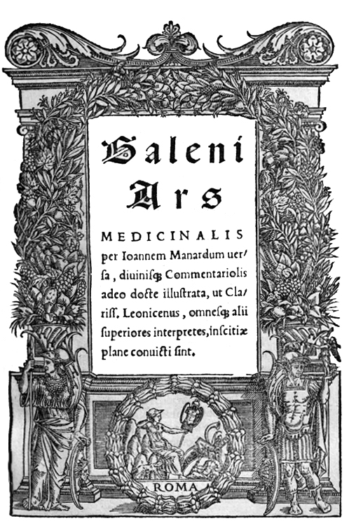 Titelblatt